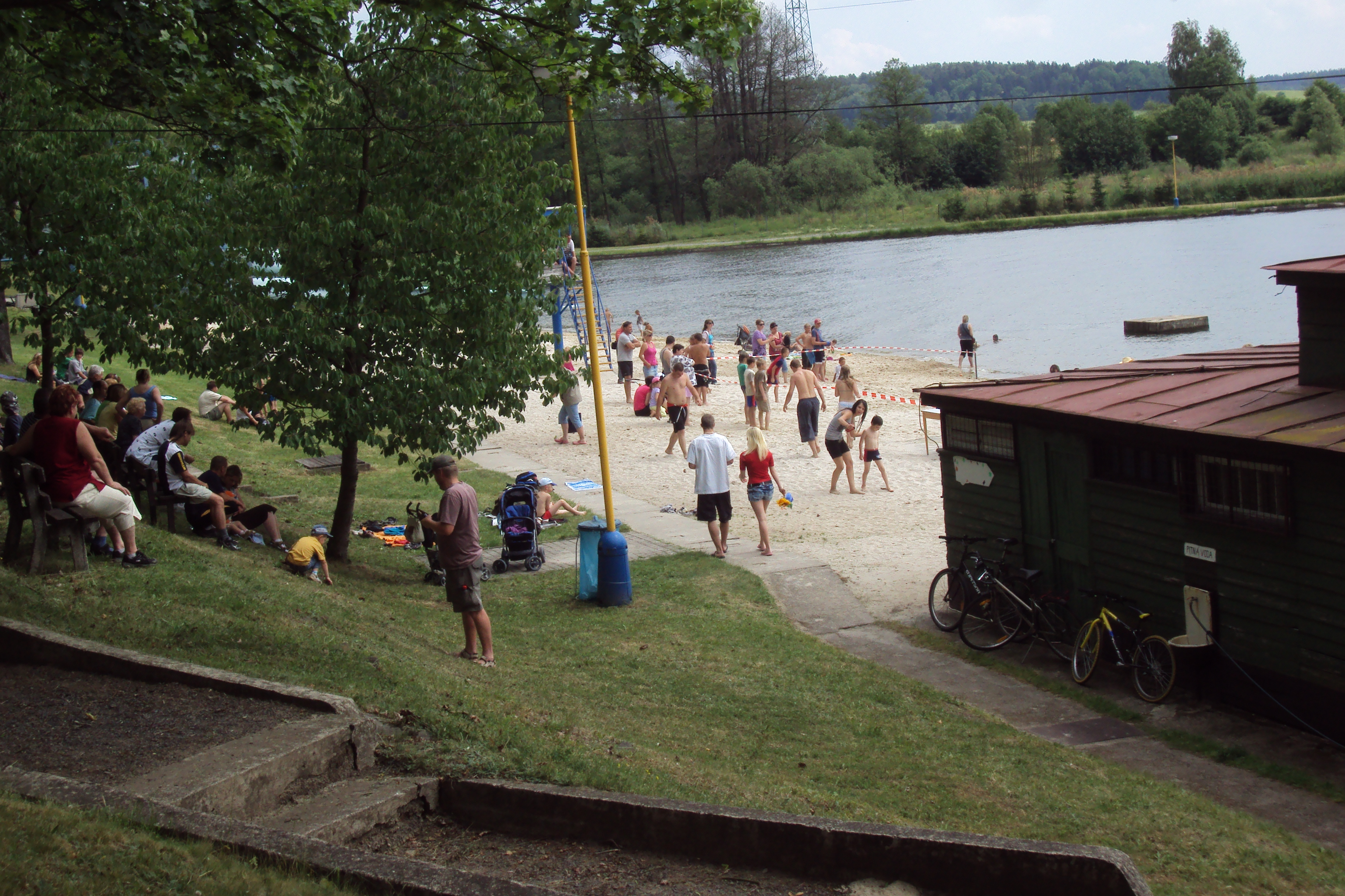 Část hlavní pláže koupaliště, s budovou občerstvení. V mapách též Zákupský rybník